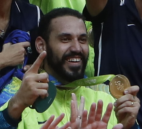 Rio de Janeiro - Seleção brasileira de vôlei ganha medalha de ouro ao vencer a Itália na final dos Jogos Olímpicos Rio 2016 no Maracanãzinho (Fernando Frazão/Agência Brasil)